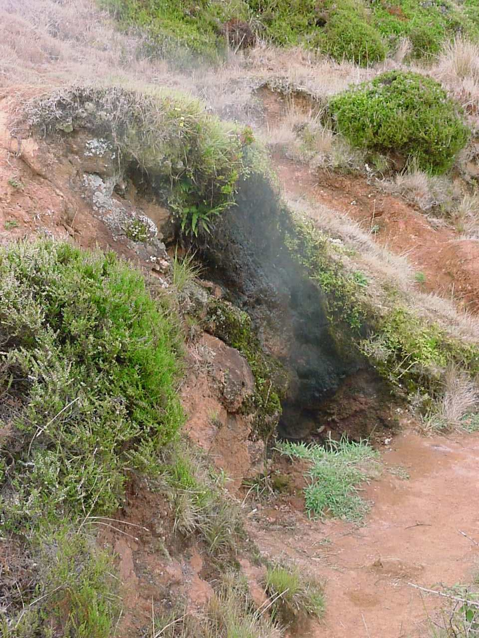 Furnas do Enxofre, ilha Terceira, Açores, Portugal.